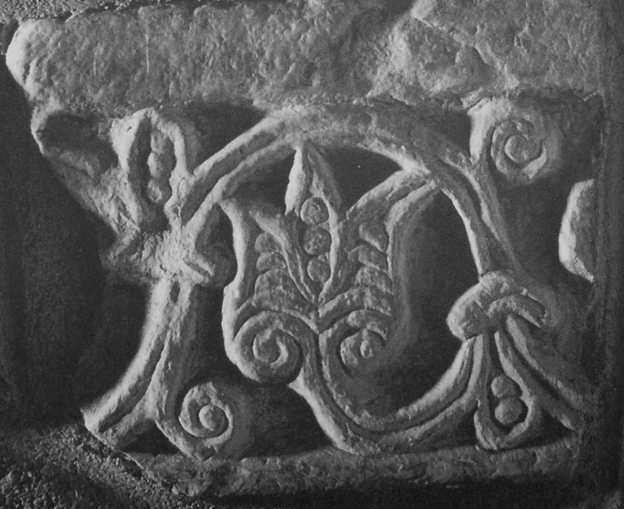 Friso procedente del yacimiento arqueológico de Guarrazar, detalle de una foto de la colección particular de Pedro Antonio Alonso Revenga.